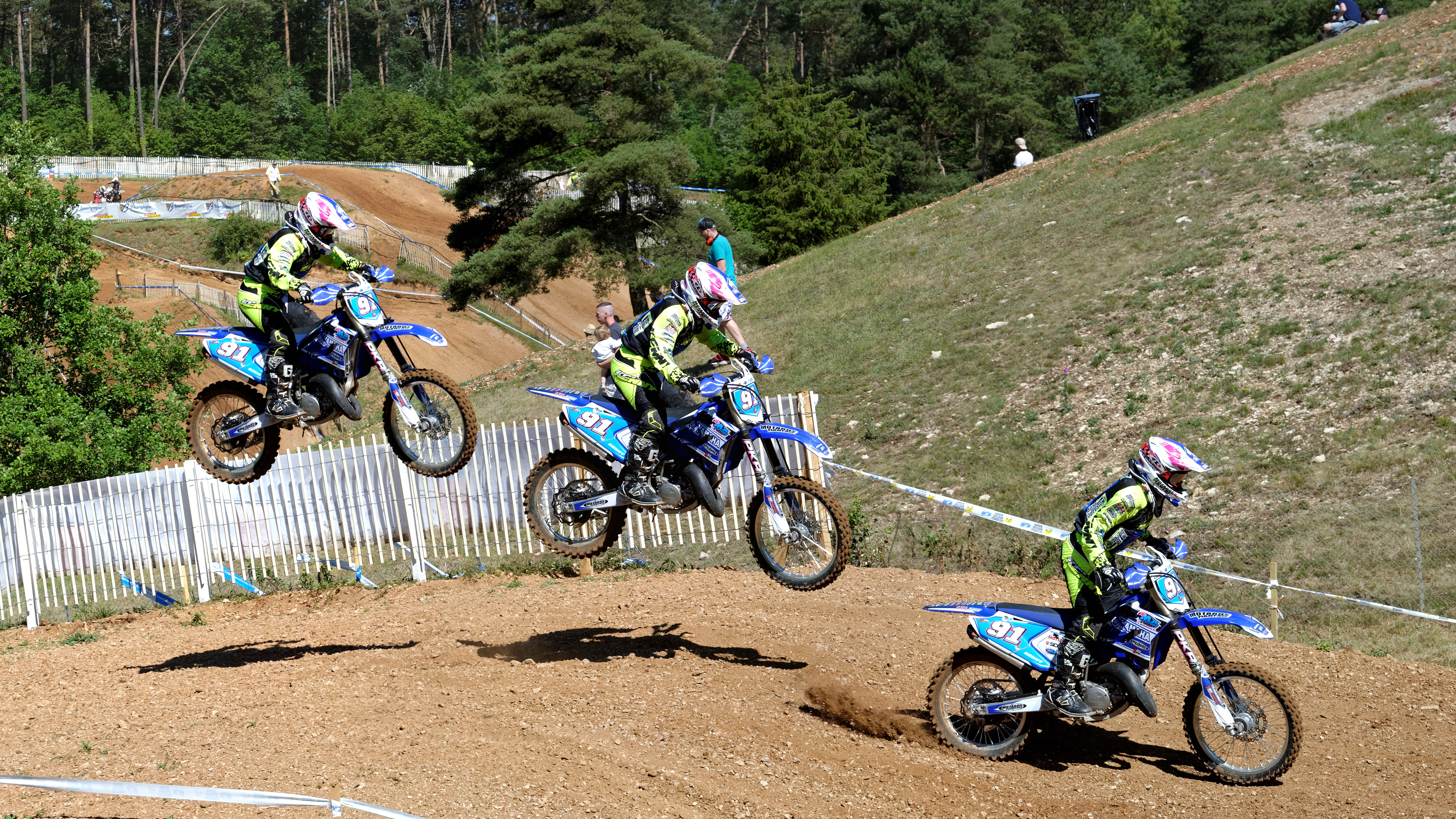 Reconstitution d'un saut de Mathilde Quenot lors de la finale du championnat de France motocross féminin 2015 organisé par l'Association Moto Club Issois (AMC Issois) le dimanche 28 juin 2015. (Is-sur-Tille, Côte d'Or, Bourgogne, France).